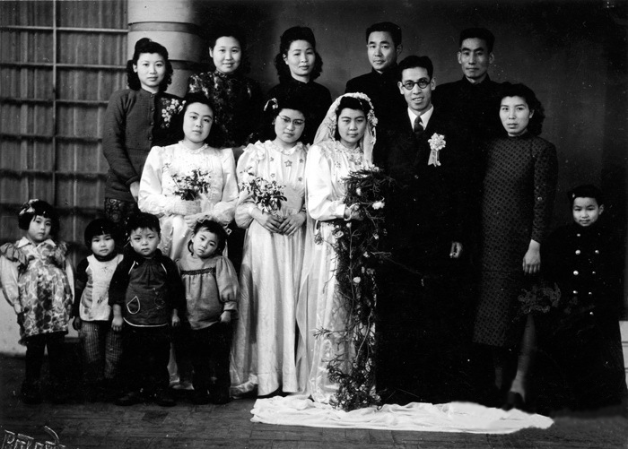 1947年，姚奠中与李树兰在贵阳结婚。